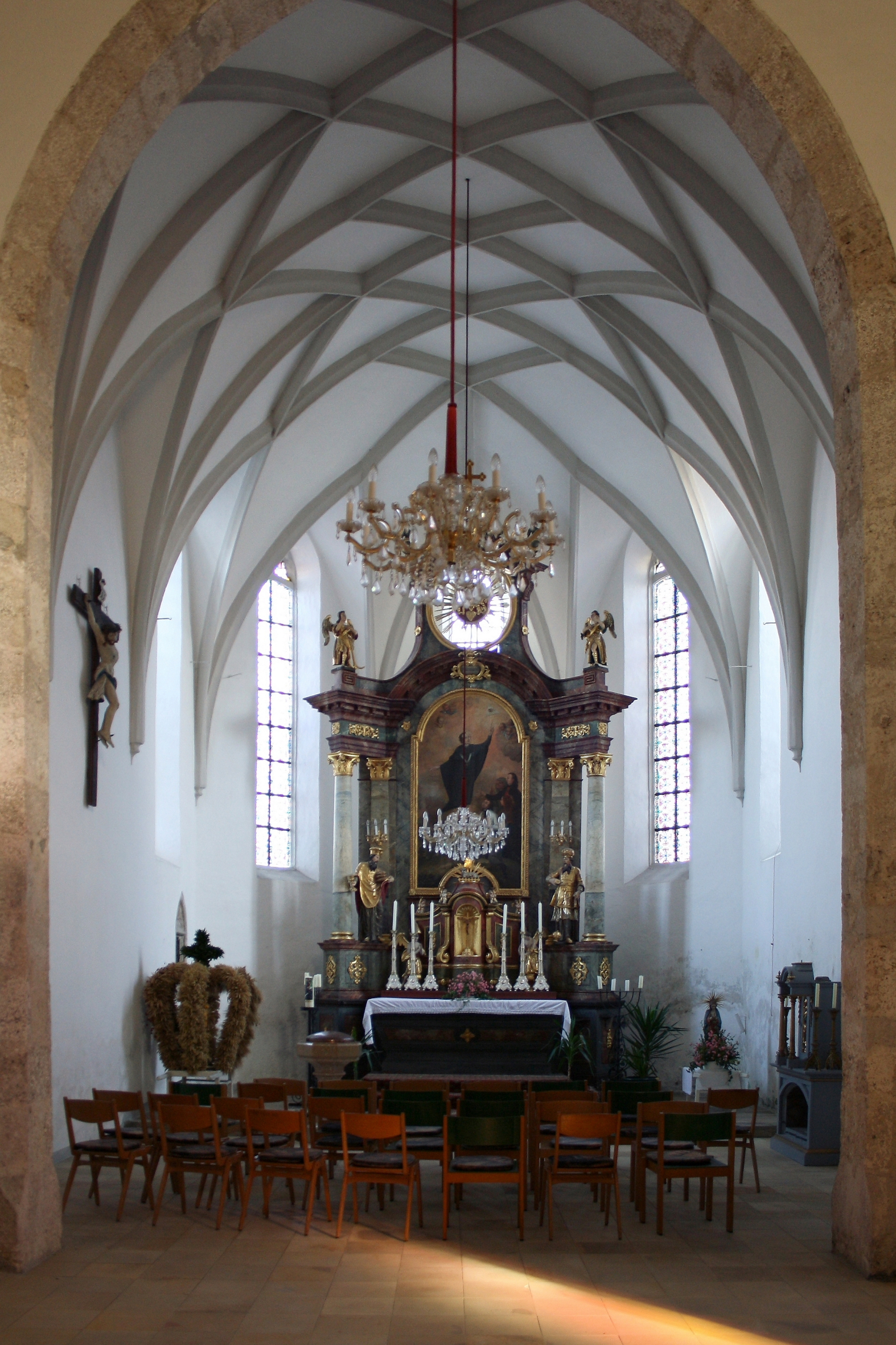 Der Altarraum der alten Pfarrkirche von Desselbrunn.